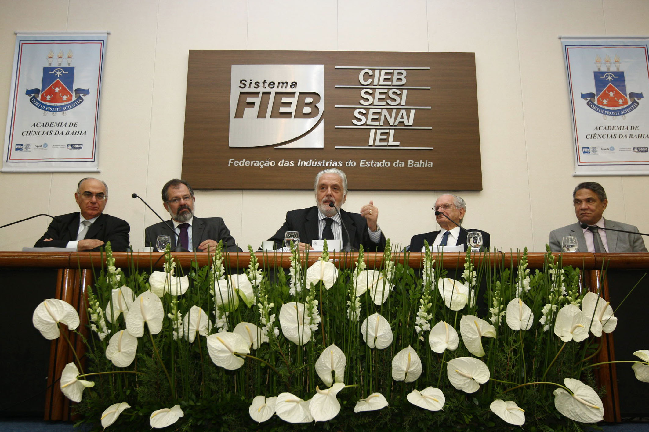 O governador Jaques Wagner, participa de instalação da Academia de Ciências da Bahia, na FIEB Foto: Manu Dias/Secom